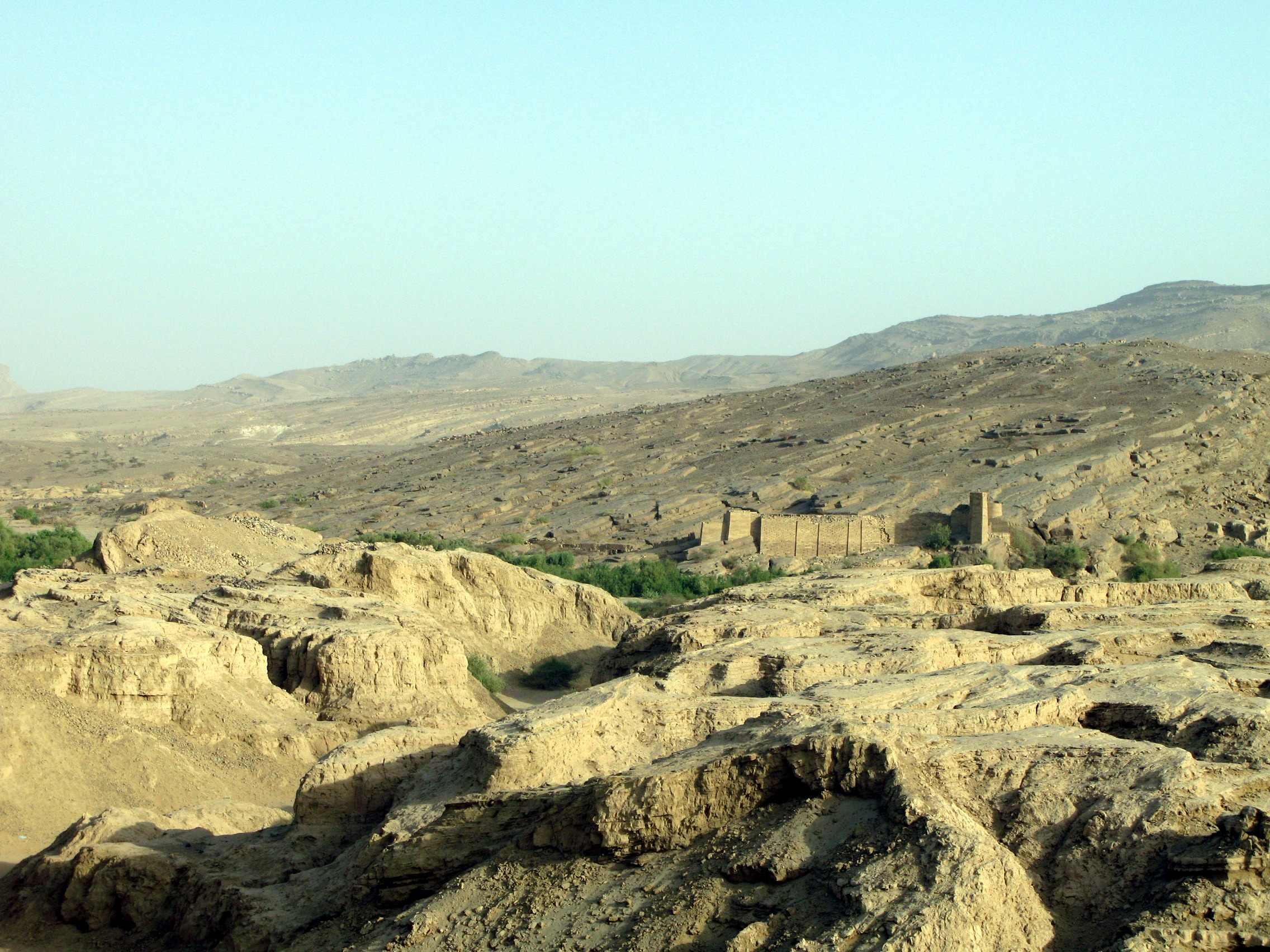 Ostanki jezu v Maribu - nov je v neposredni bližini